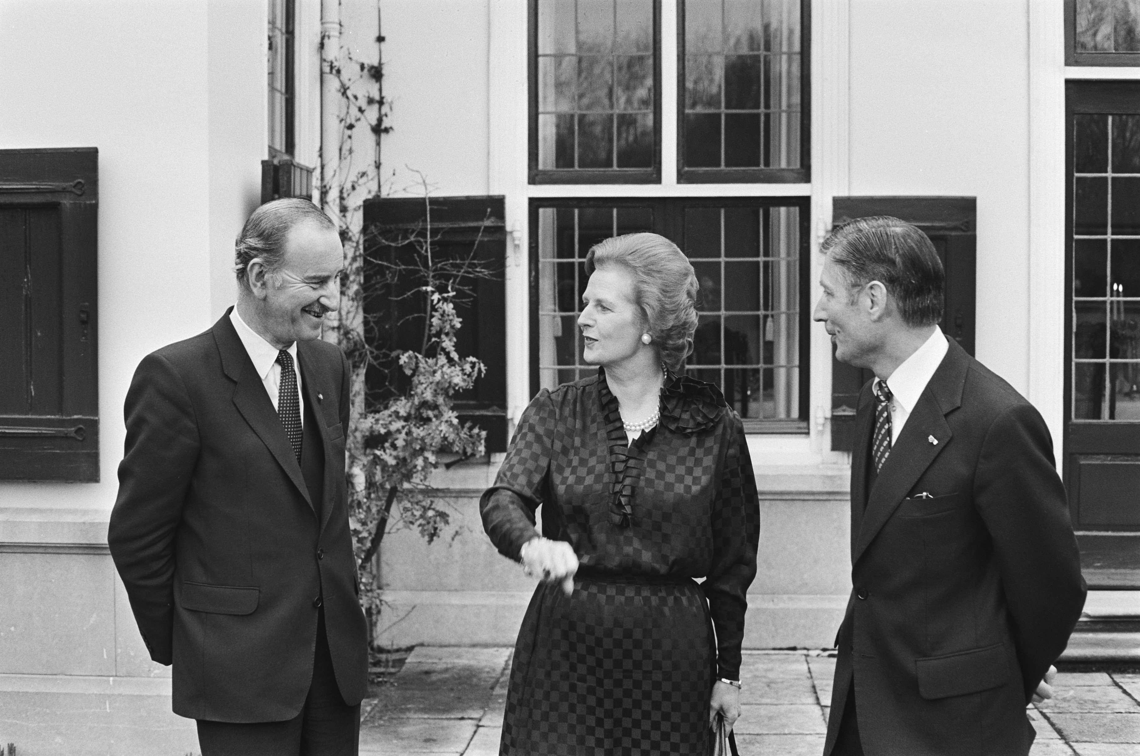 Collectie / Archief : Fotocollectie Anefo Reportage / Serie : [ onbekend ] Beschrijving : V.l.n.r. Minister Chris van der Klaauw, Premier Margareth Thatcher en Minister-president Dries van Agt op het terras van het Catshuis Datum : 6 februari 1981 Locatie : Den Haag, Zuid-Holland Trefwoorden : ambtswoningen, bezoeken, gebouwen, ministers, ministers-presidenten, tuinen Persoonsnaam : Agt, Dries van, Klaauw, C.A. van der, Thatcher, Margaret Fotograaf : Antonisse, Marcel / Anefo, [onbekend] Auteursrechthebbende : Nationaal Archief Materiaalsoort : Negatief (zwart/wit) Nummer archiefinventaris : bekijk toegang 2.24.01.05 Bestanddeelnummer : 931-3062